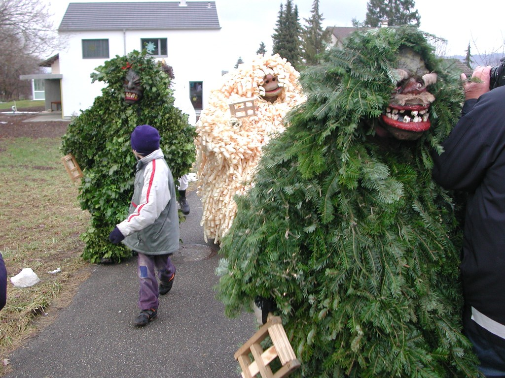 Figures from "Bärzeli" in Hallwil - De Stächpaumig, de Hobuspöönig und de Tannreesig